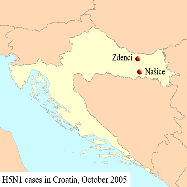 Own work